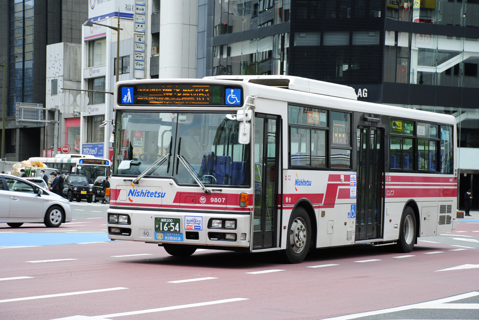 2020-4-15 天神付近にて撮影